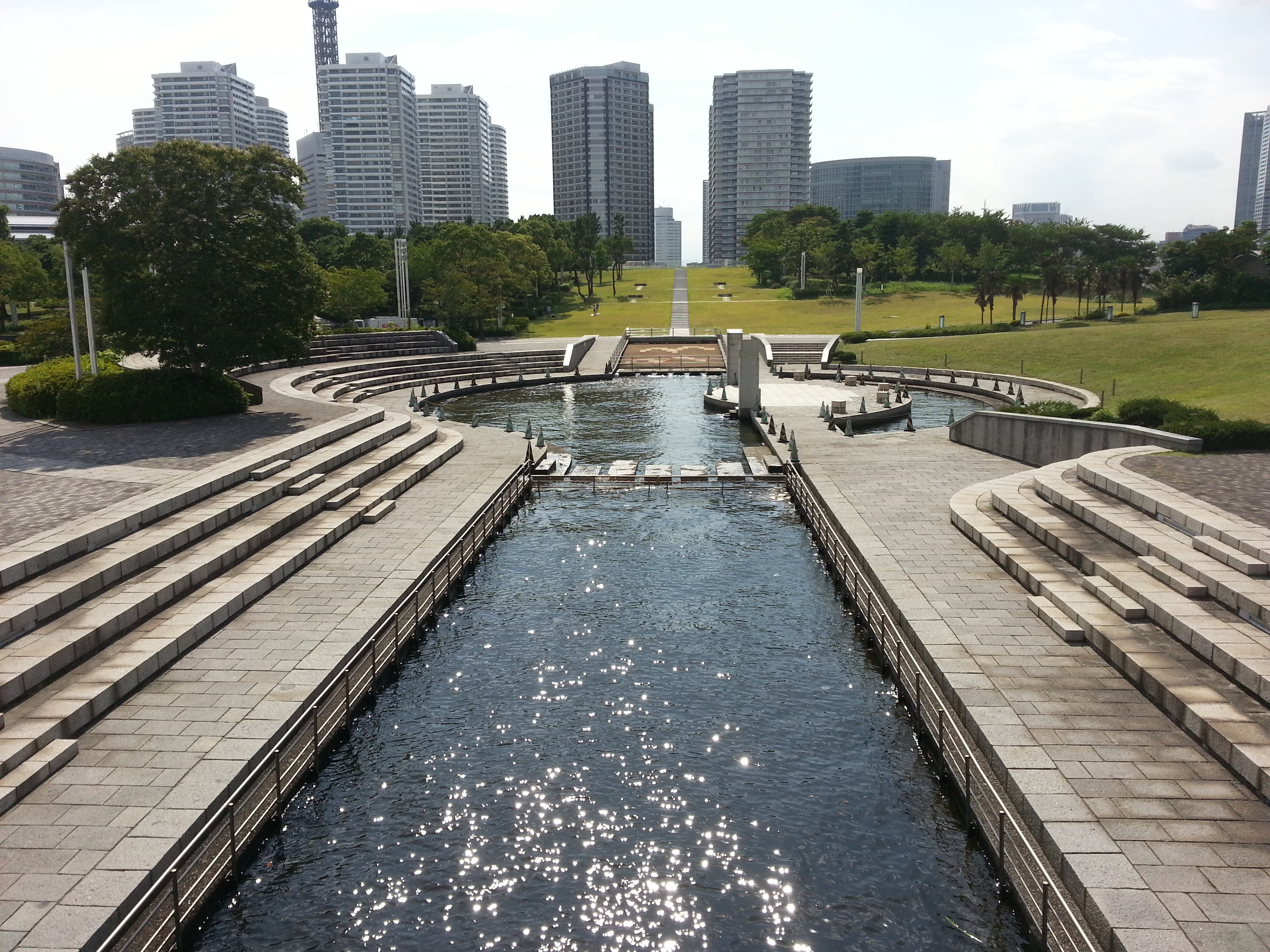 臨港パークにある「潮入りの池」。キング軸の海側到達点。奥にキング軸の一部となる階段が整備されている（2013年7月）。